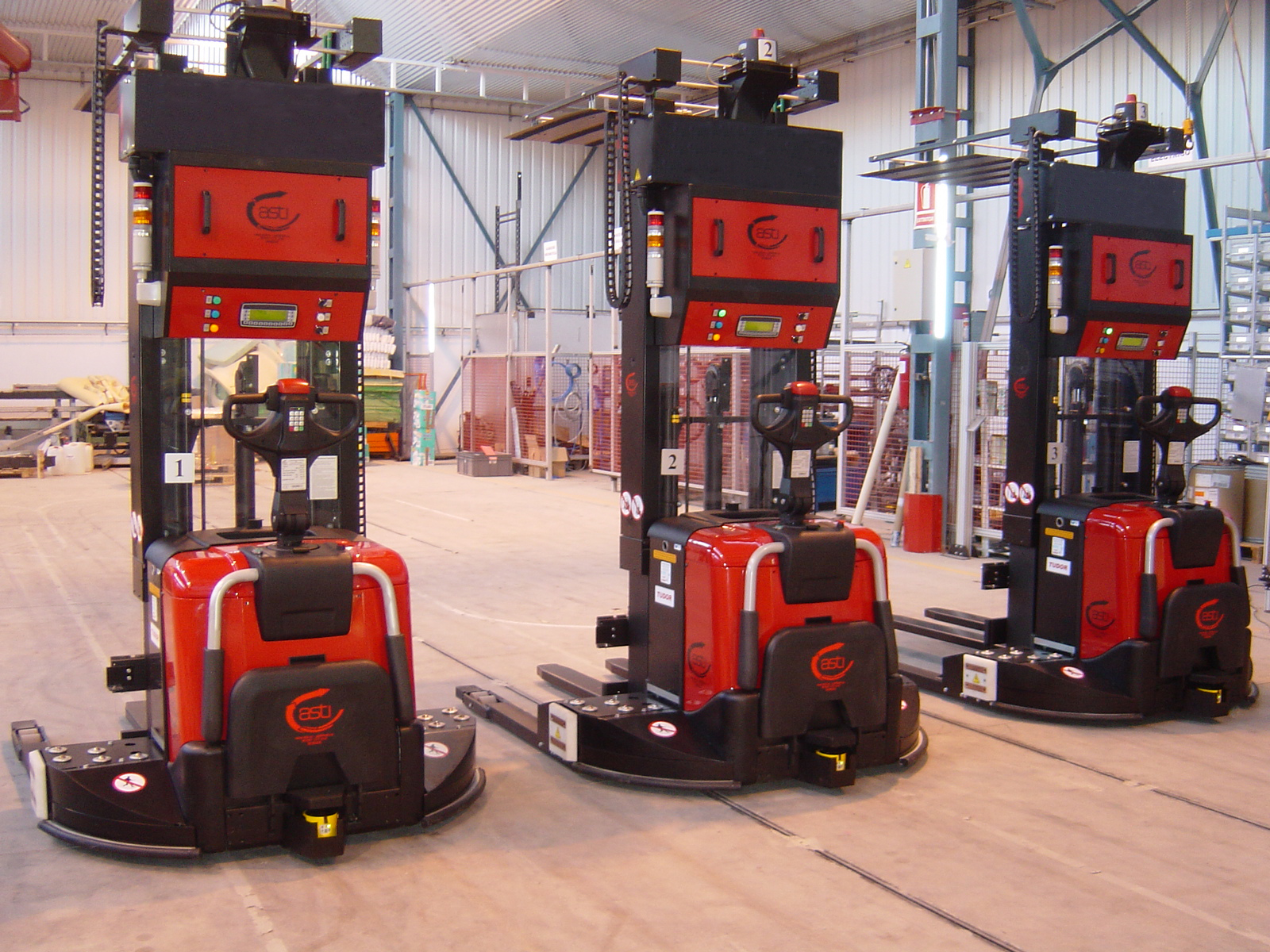 AGV con pisón para seguridad de la carga (Arbora & Ausonia y ASTI, Innovando juntos en Mequionenza)